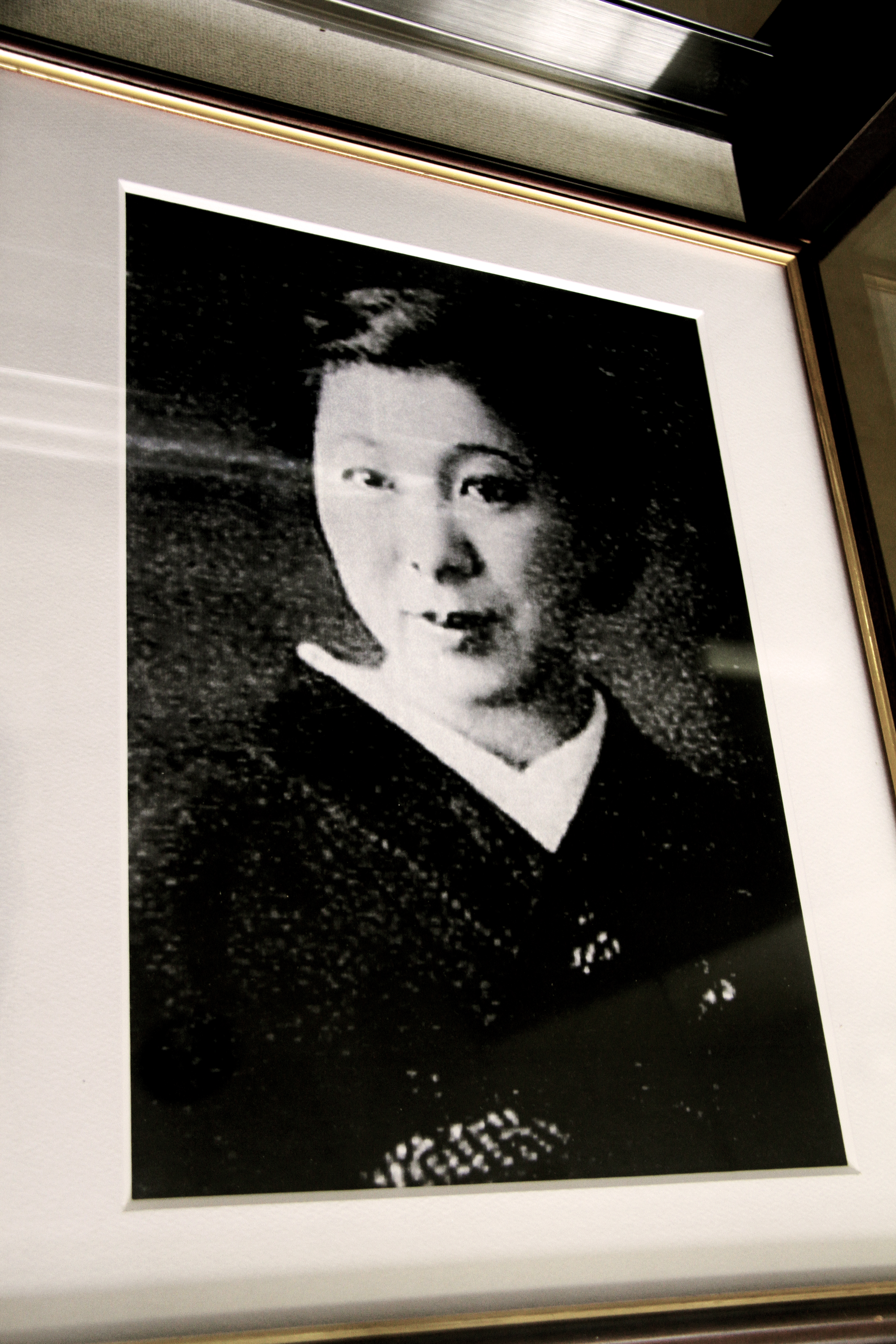 福岡県八女市の八女市立図書館2階にある山本健吉資料室に展示されている石橋秀野の写真。